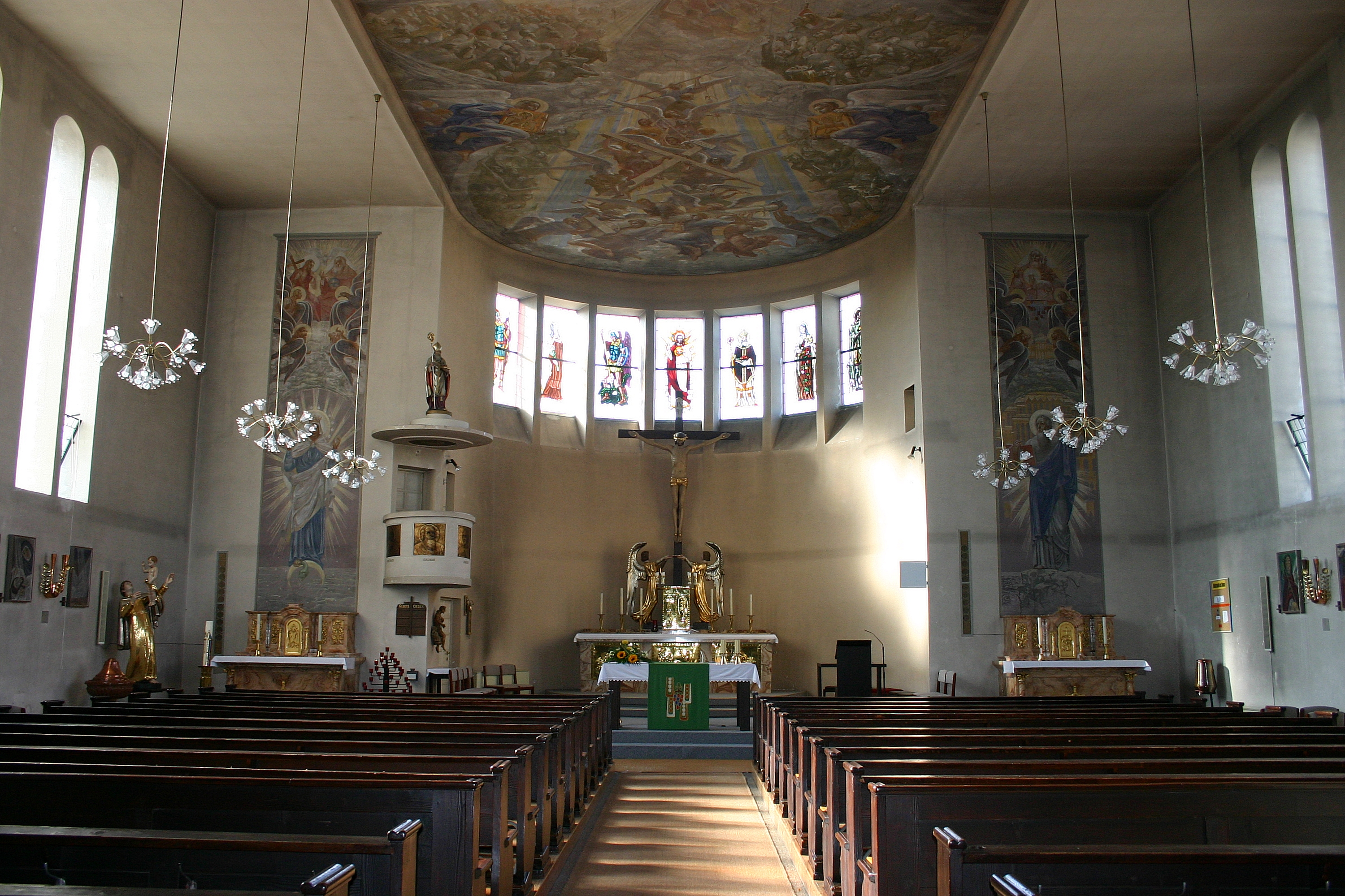 Andau Innenansicht der römisch-katholischen Pfarrkirche